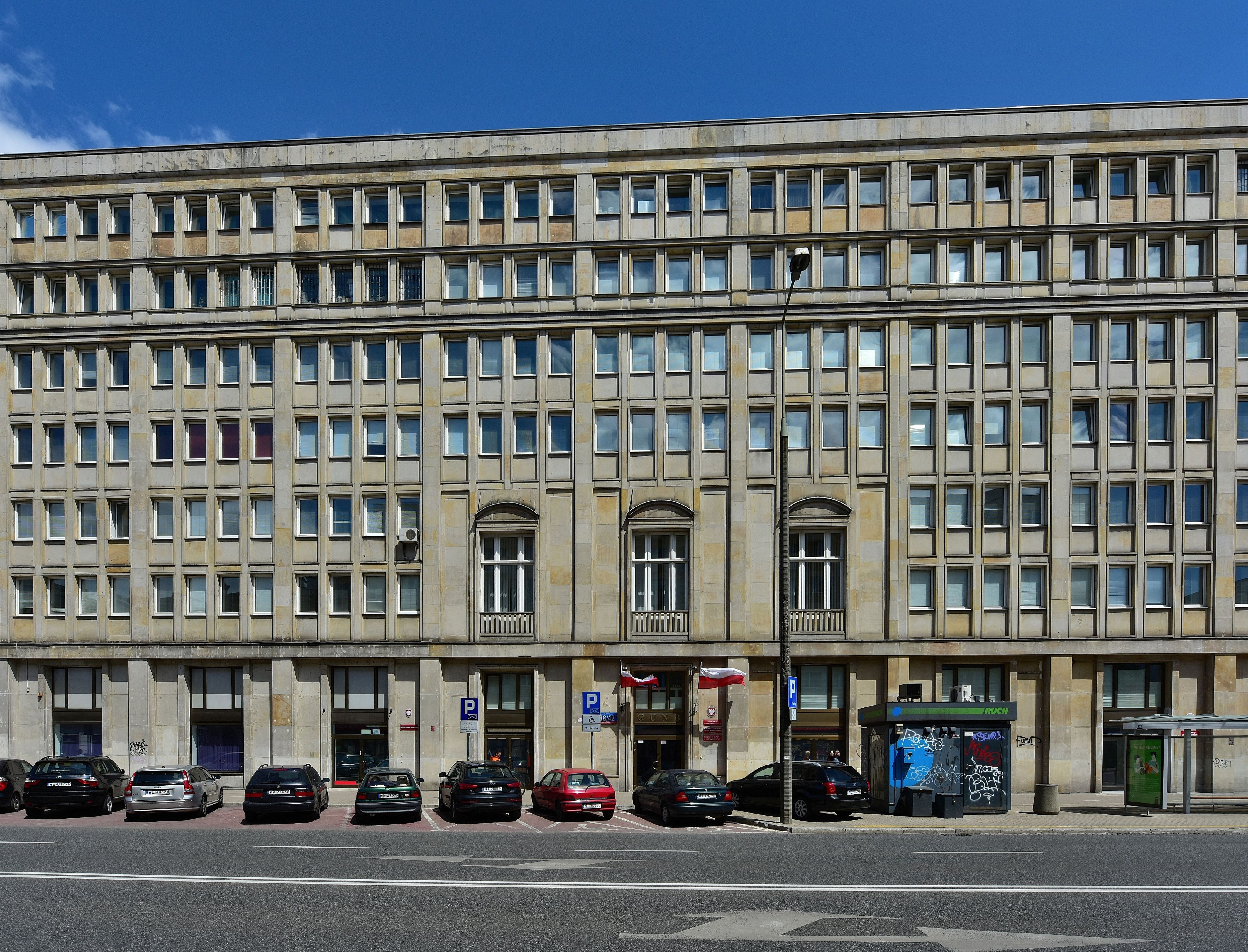 Siedziba Głównego Urzędu Nadzoru Budowlanego przy ul. Kruczej 38/42 w Warszawie